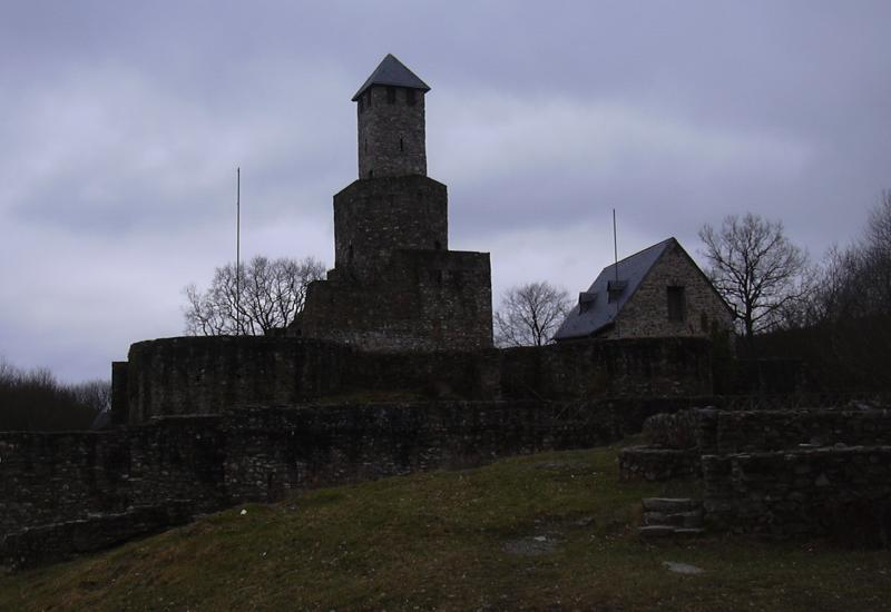 de: Die Grimburg beim gleichnamigen Ort en: Castle of Grimburg, Germany